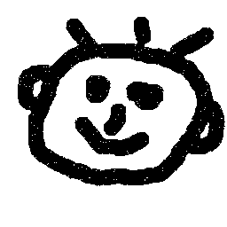 Das Ausgangsbild Bild:Rauschbild.png wurde mit globalem Schwellwertverfahren mit dem Schwellwert 30 segmentiert.